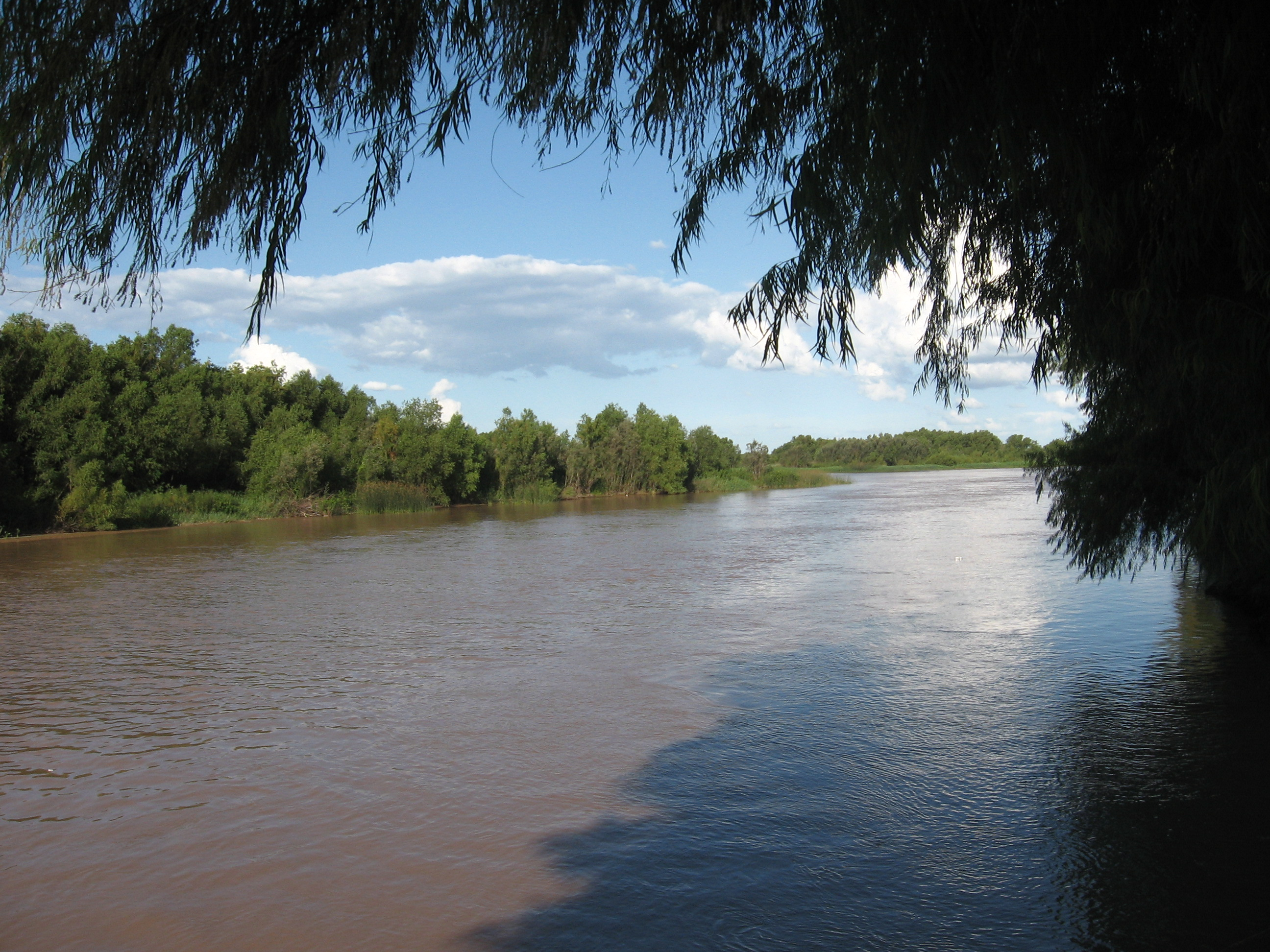 Arroyo afluente del Río Paraná, en la ciudad de San Pedro